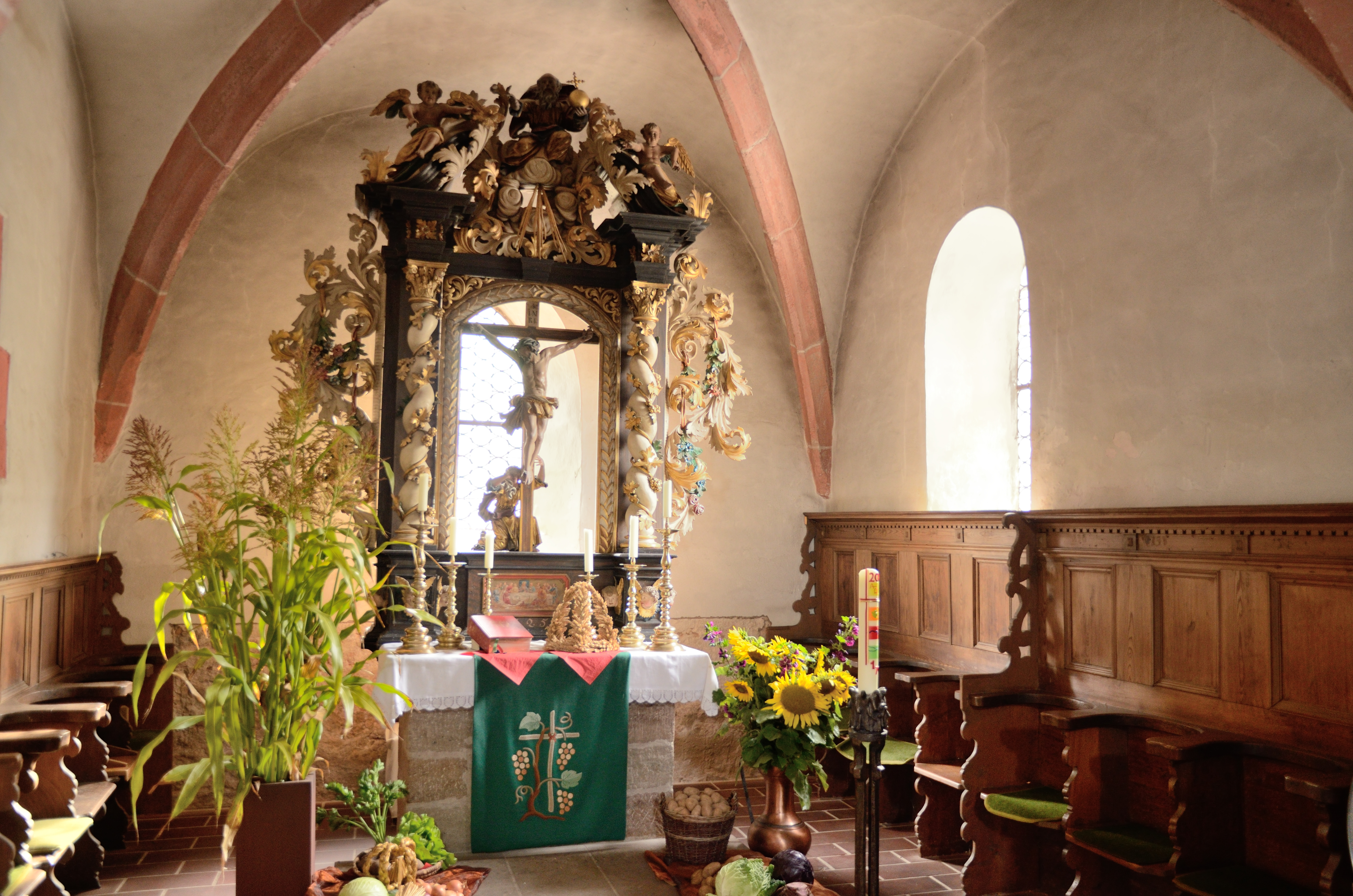 St. Veitskirche (Veitsbronn), Chorraum